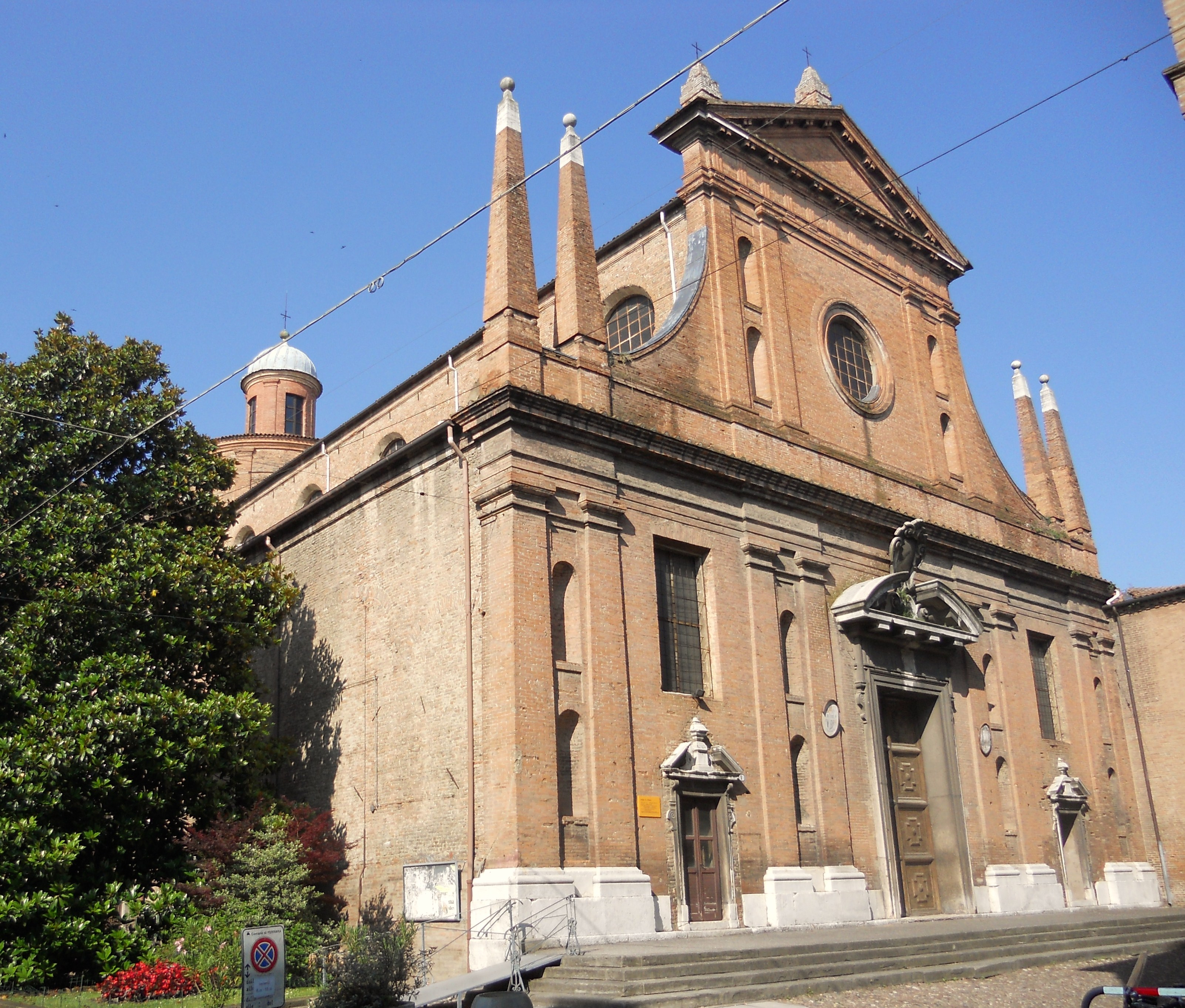 Chiesa di San Paolo a Ferrara